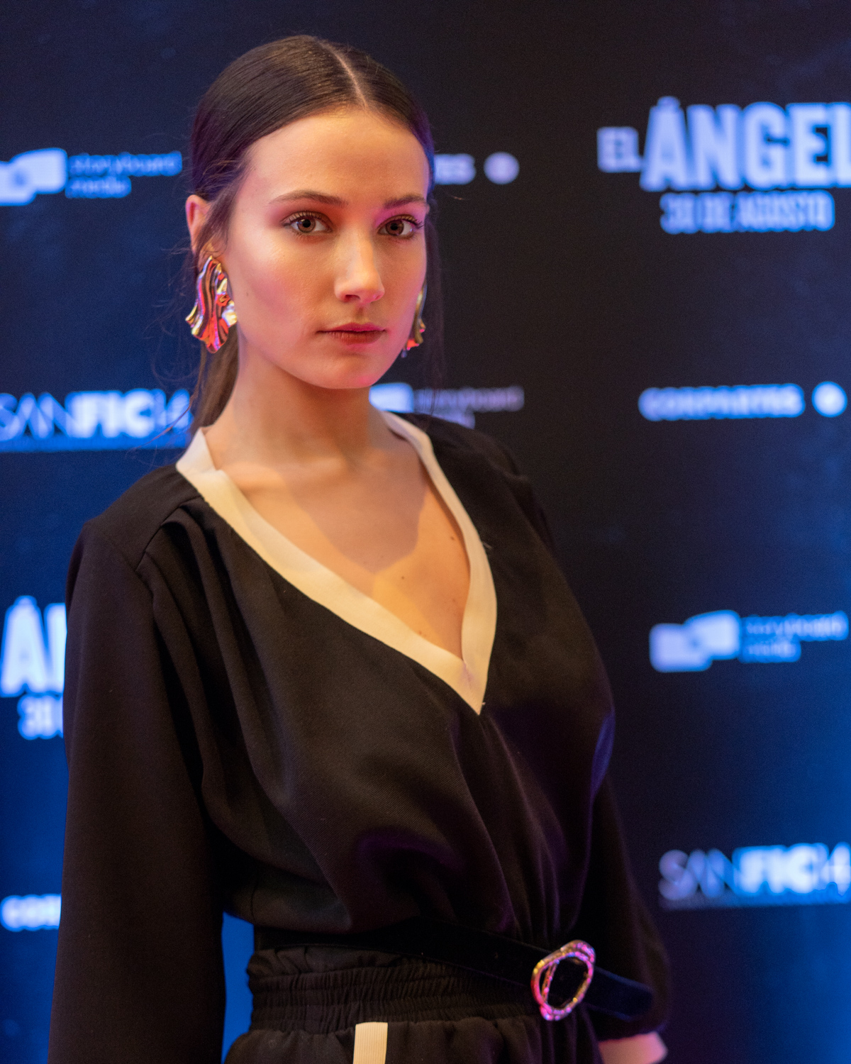 Geraldine Neary durante la inauguración de Sanfic 2018